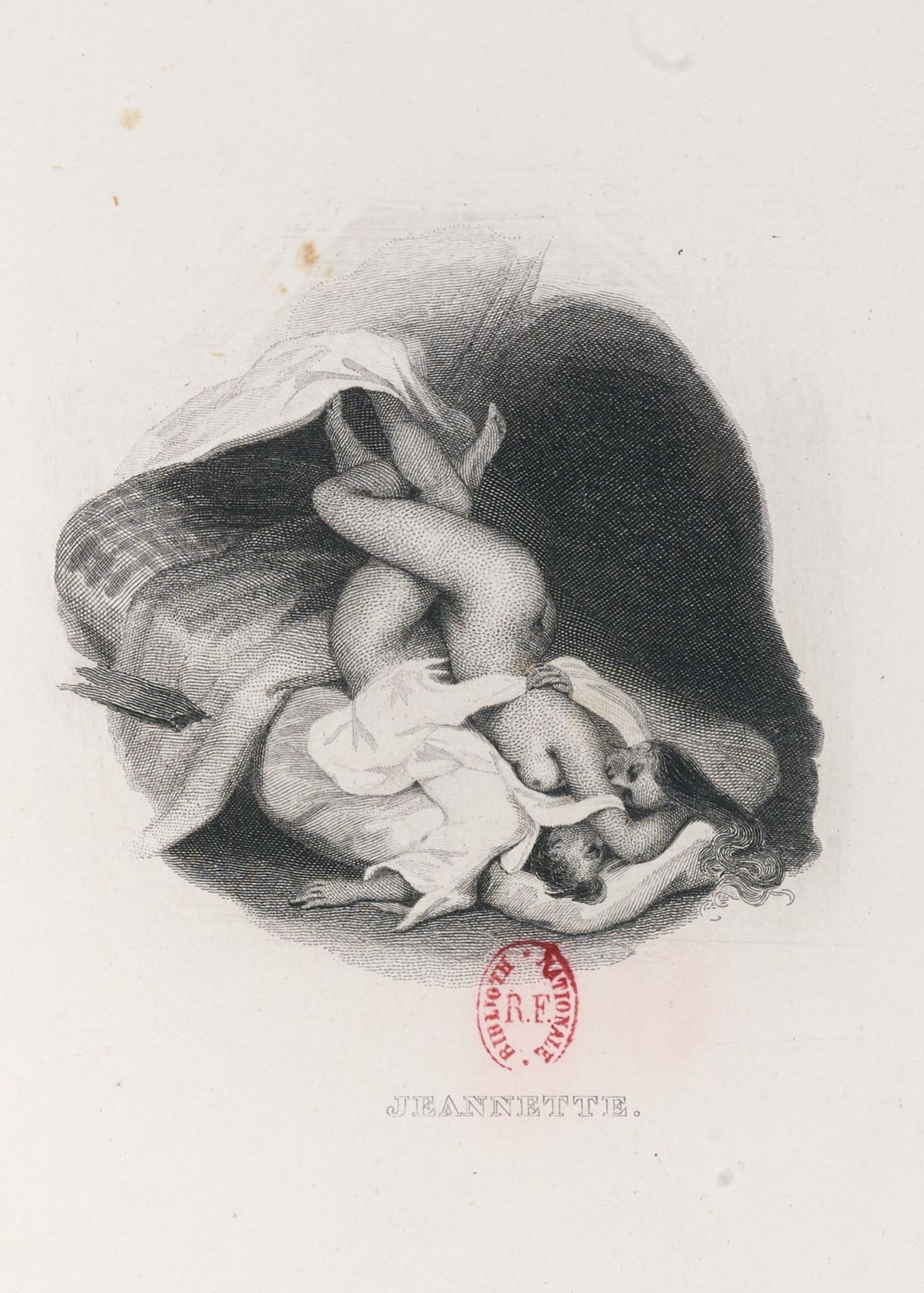 Lithographie de Tony Johannot destinées à l'illustration de certaines " Chansons de Béranger "